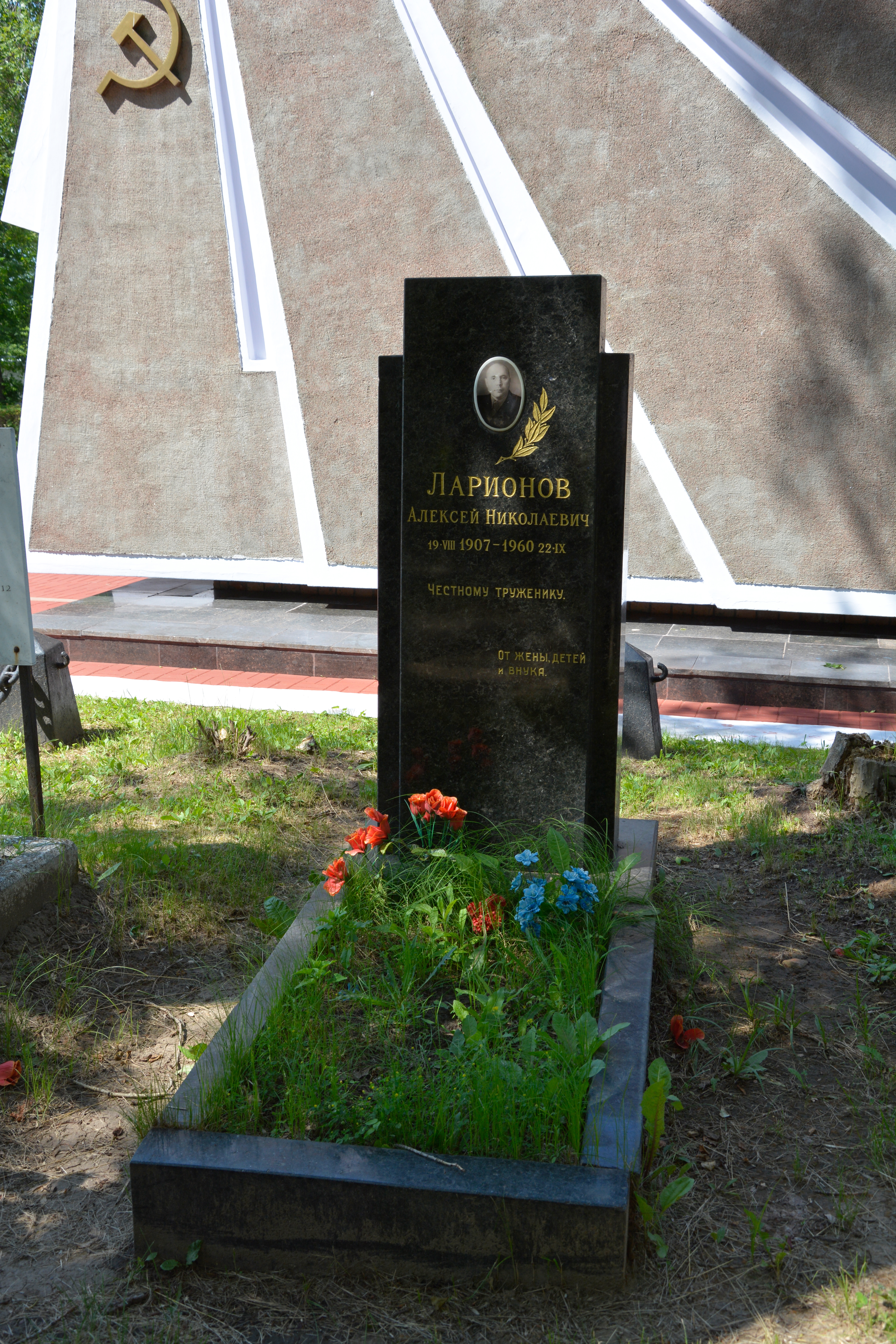 Могила Алексея Николаевича Ларионова на Скорбященском кладбище г. Рязани. 25 июня 2020 г.